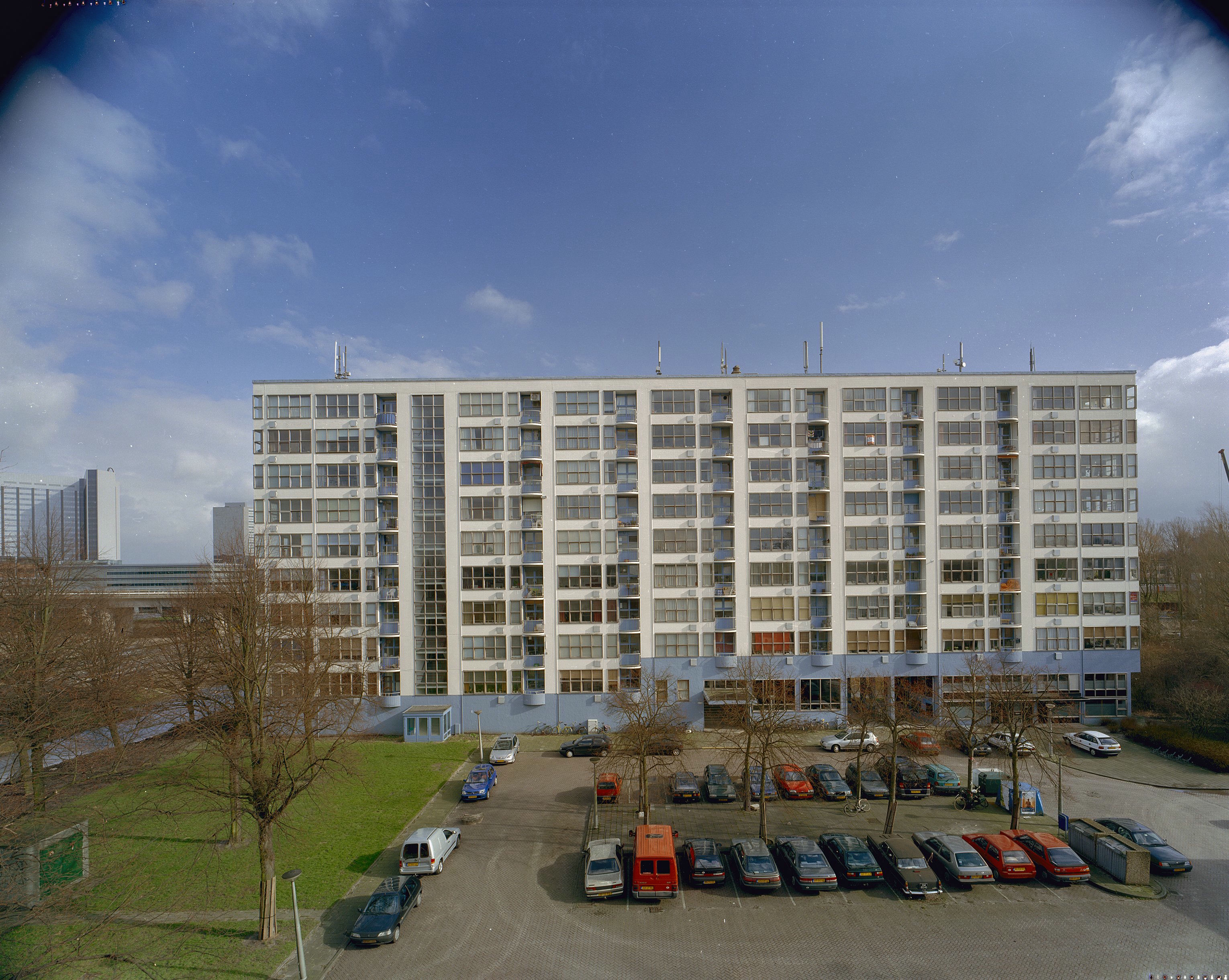 Flatgebouw Westereind: Overzicht voorgevel (opmerking: Gefotografeerd voor Monumenten van Herrezen Nederland)